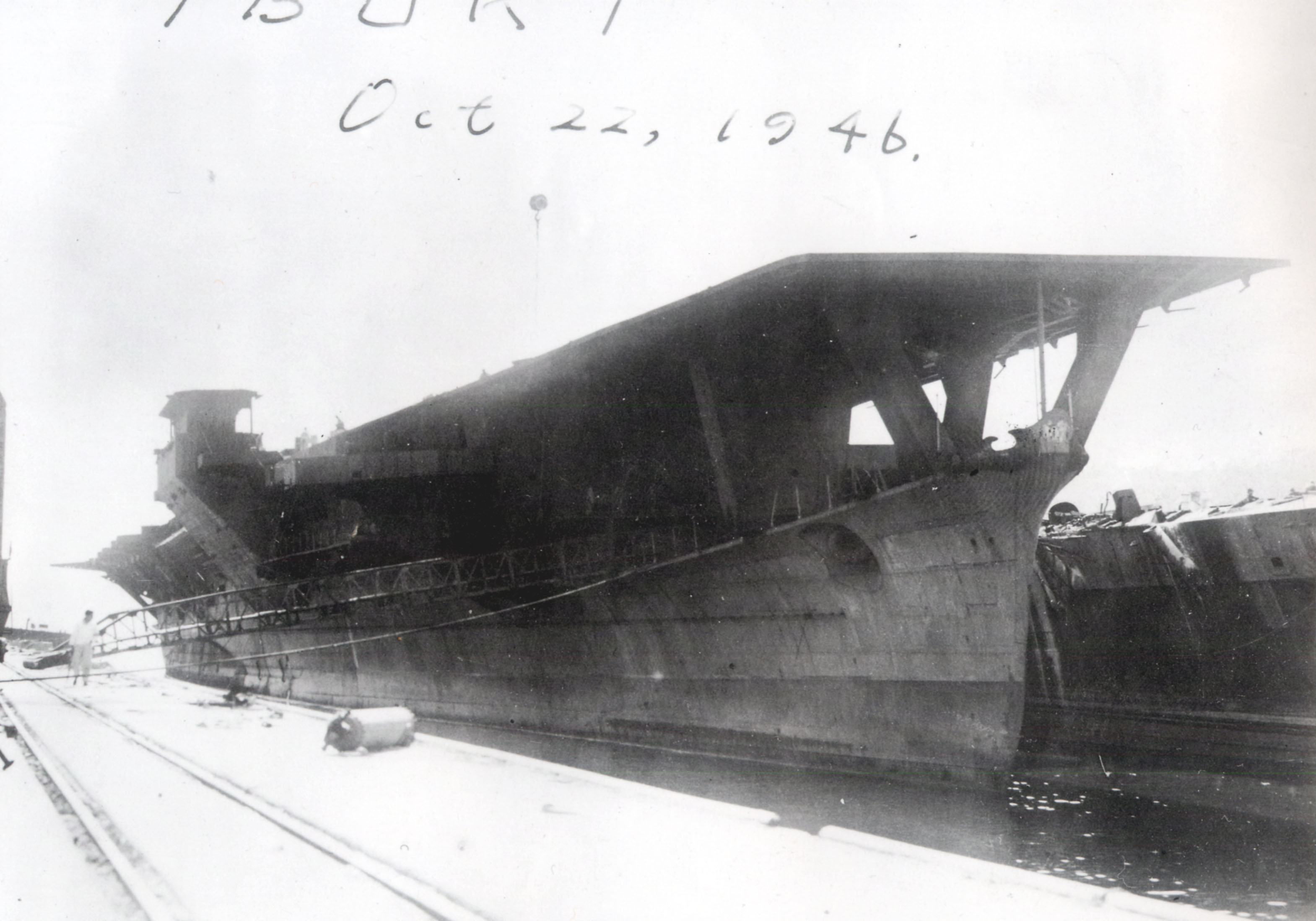 日本海軍航空母艦「伊吹」解体の為旧佐世保海軍工廠にて撮影された写真。